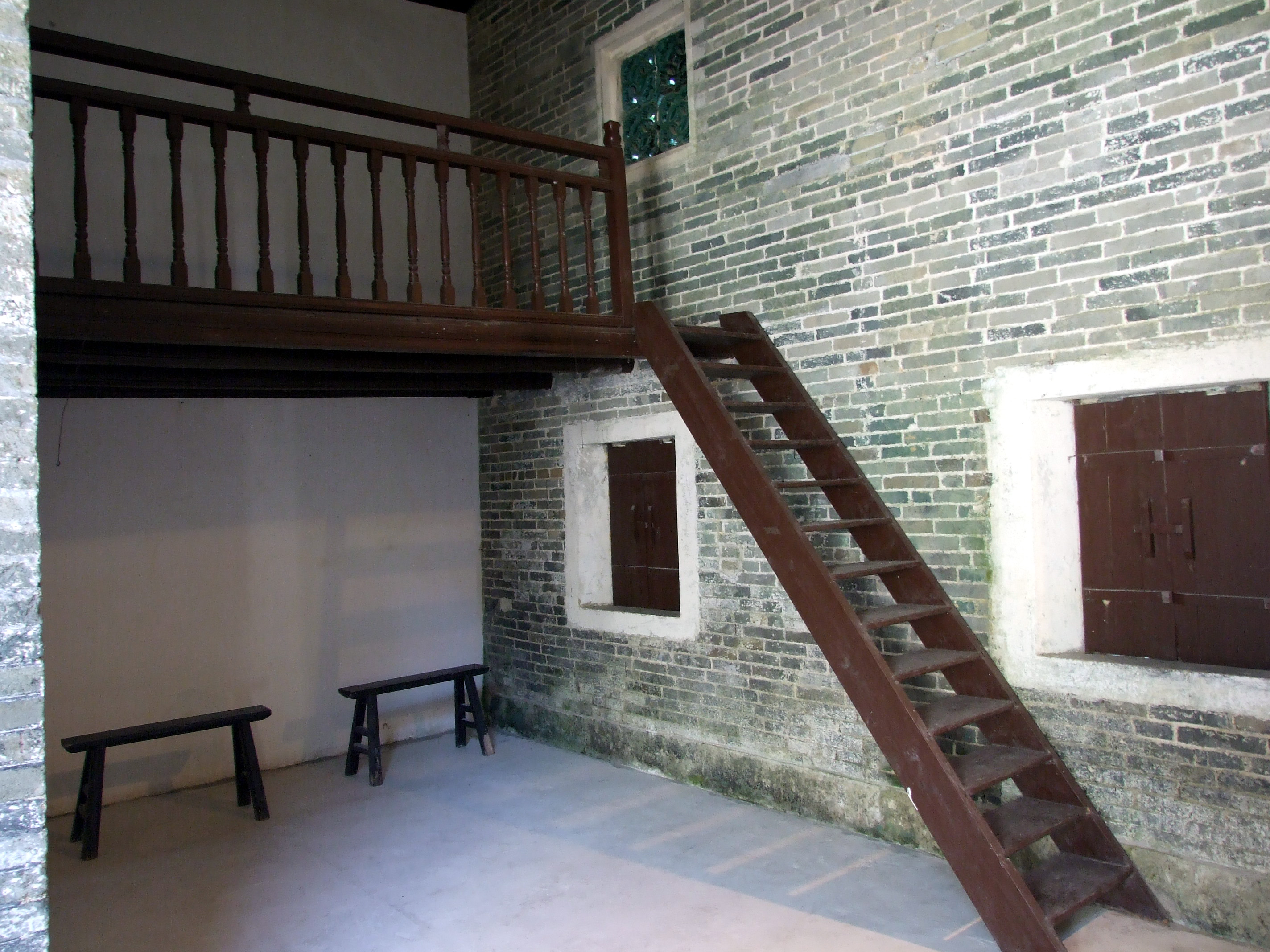 中文（香港）: 鏡蓉書屋登上層的階梯